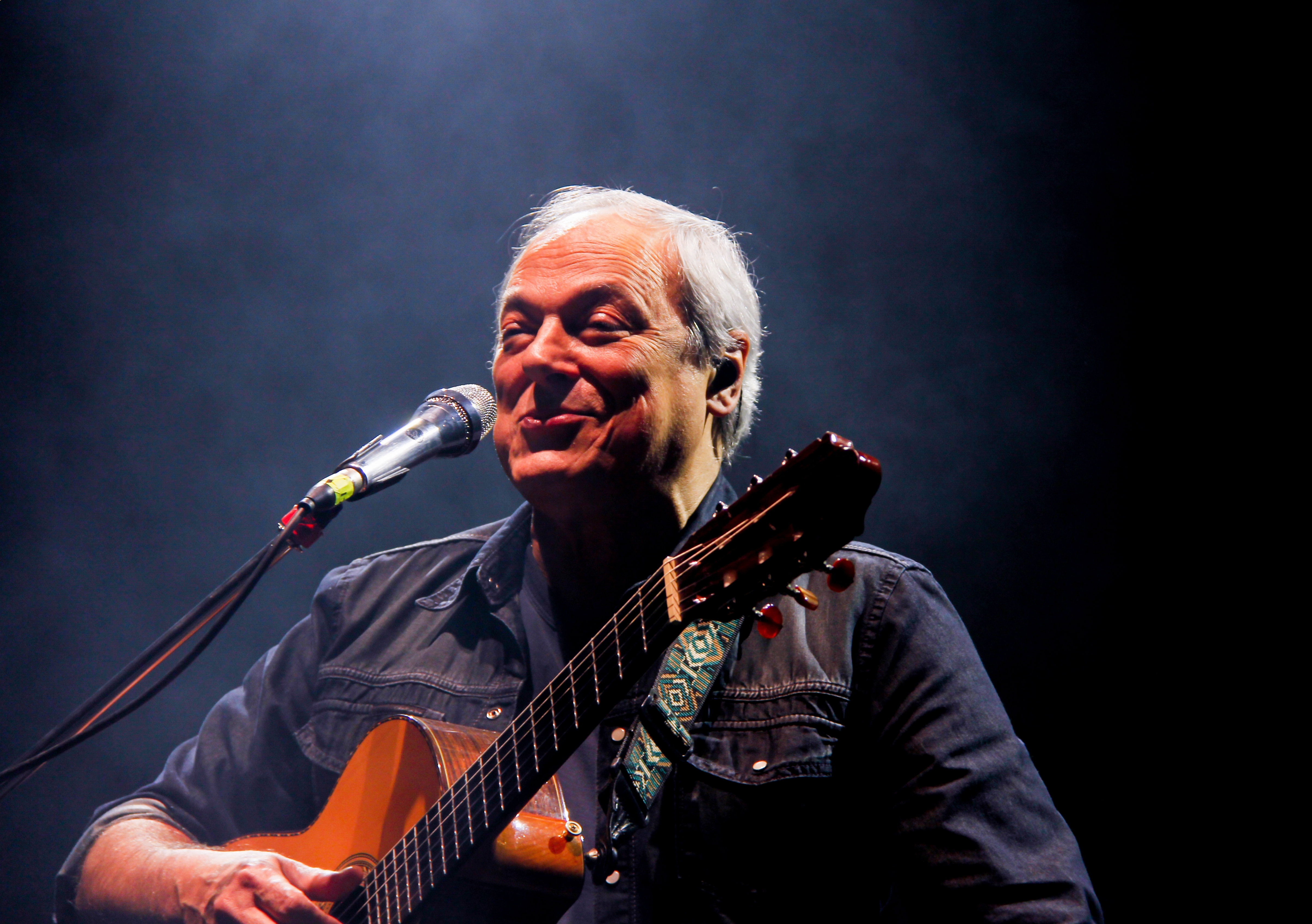 Toquinho-75